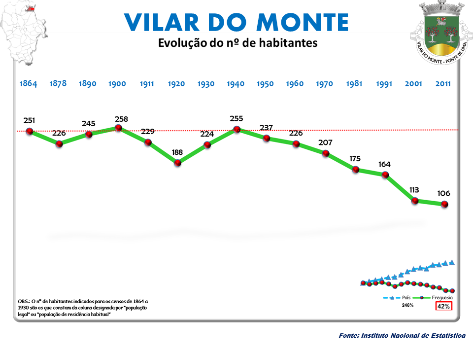 Censos 1864/2011